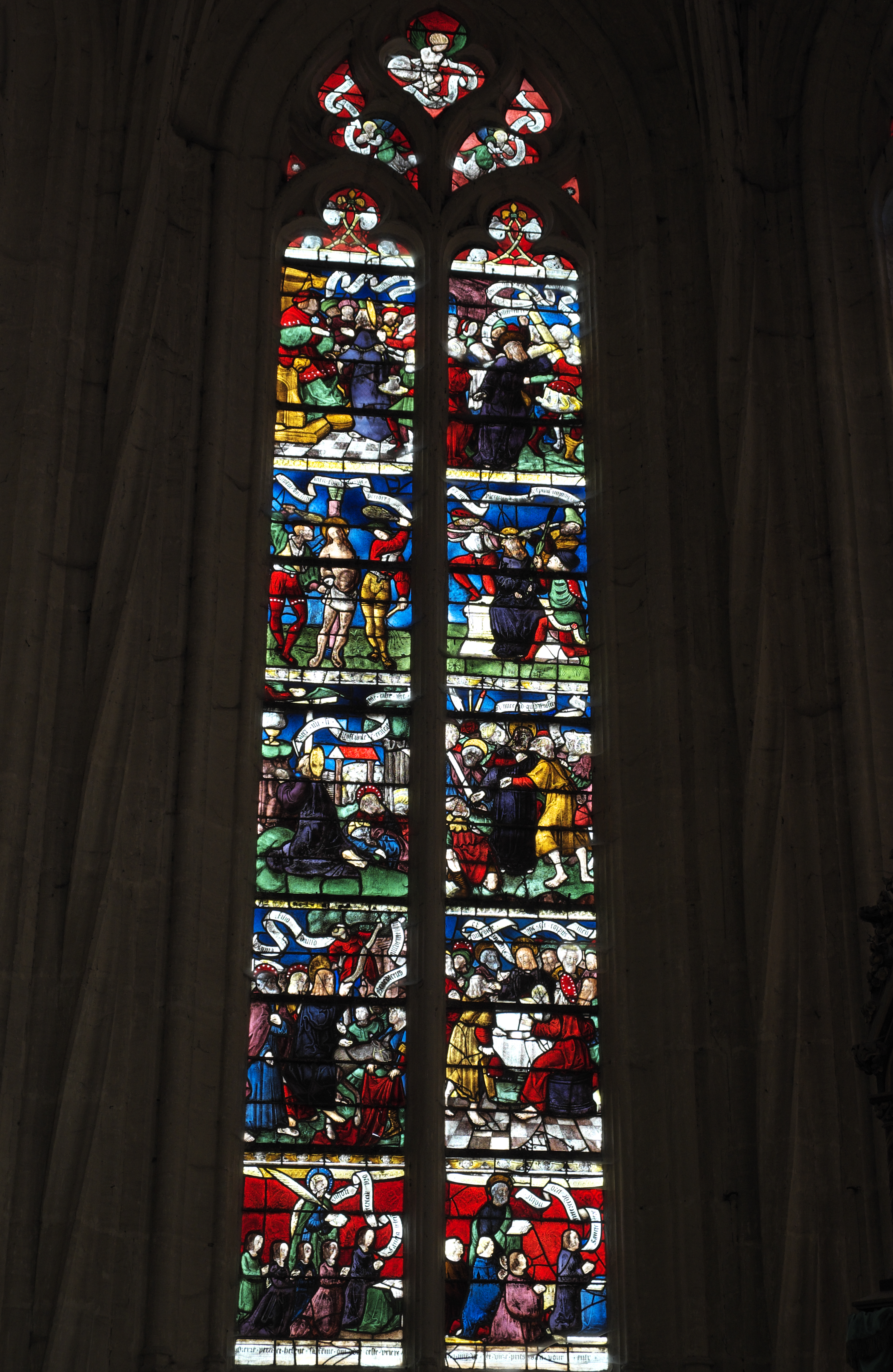 Katholische Kirche Saint-Remi in Ceffonds im Département Haute-Marne (Champagne-Ardenne/Frankreich), Bleiglasfenster (baie 1) im Chor, von 1511; Darstellung: Einzug in Jerusalem und Leidensgeschichte, unten Stifter mit Schutzpatronen .